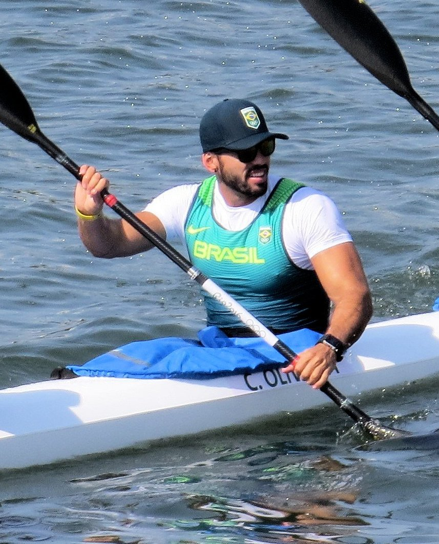 Sx50